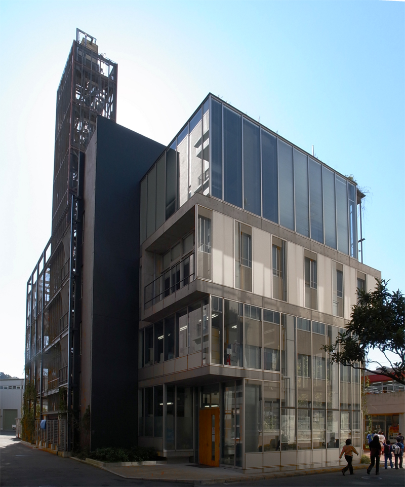 関東学院大学大沢記念建築設備工学研究所